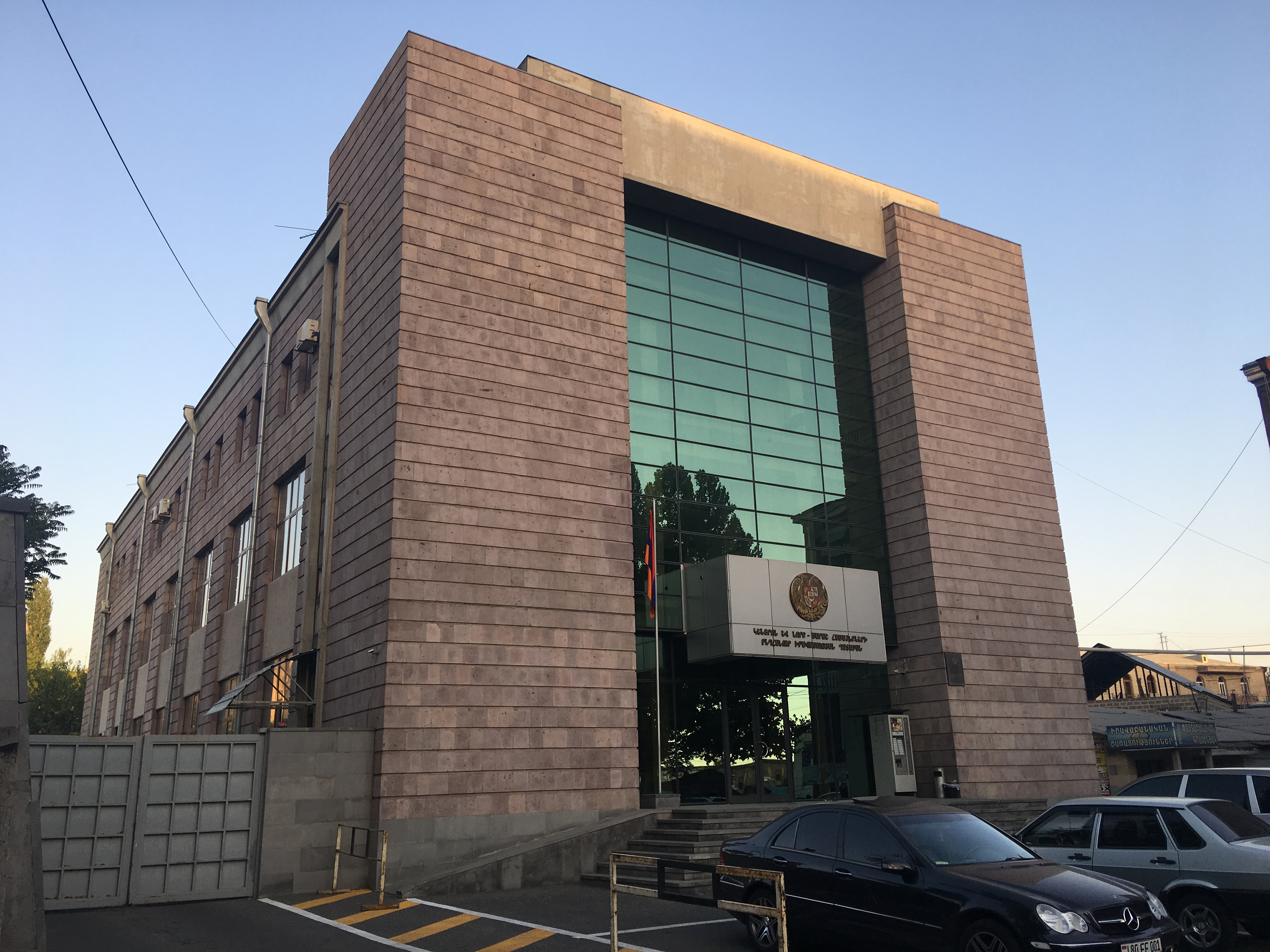 Կենտրոն և Նորք-Մարաշ վարչական շրջանների ընդհանուր իրավասության դատարան, Երևան, Հայաստան